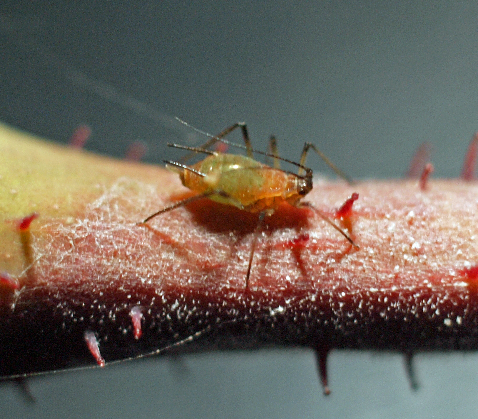 Große Rosenblattlaus (Macrosiphum rosae)